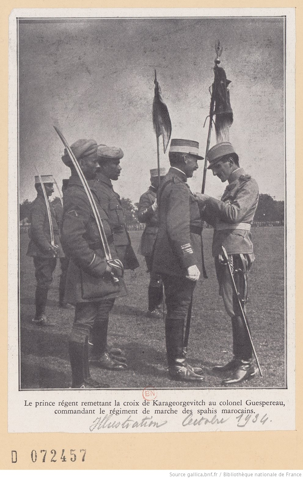 [Recueil. Portraits d'Alexandre Karageorgévitch I (1888-1934), roi de Yougoslavie] Le prince régent remettant la croix de Karageorgévitch au colonel Guespereau, commandant le régiment de marche des spahis marocains